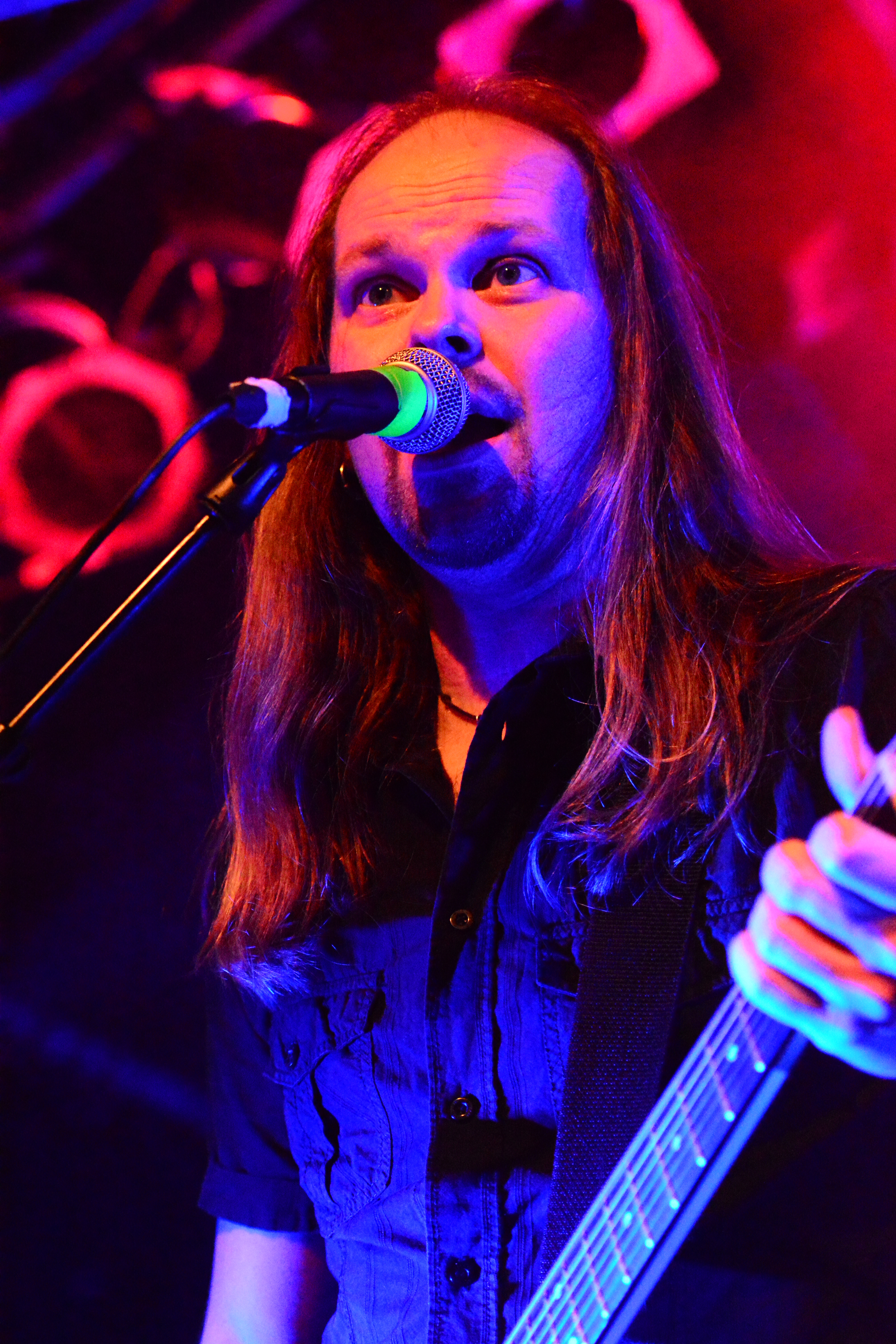 Edguy bei den Hamburg Metal Dayz 2014